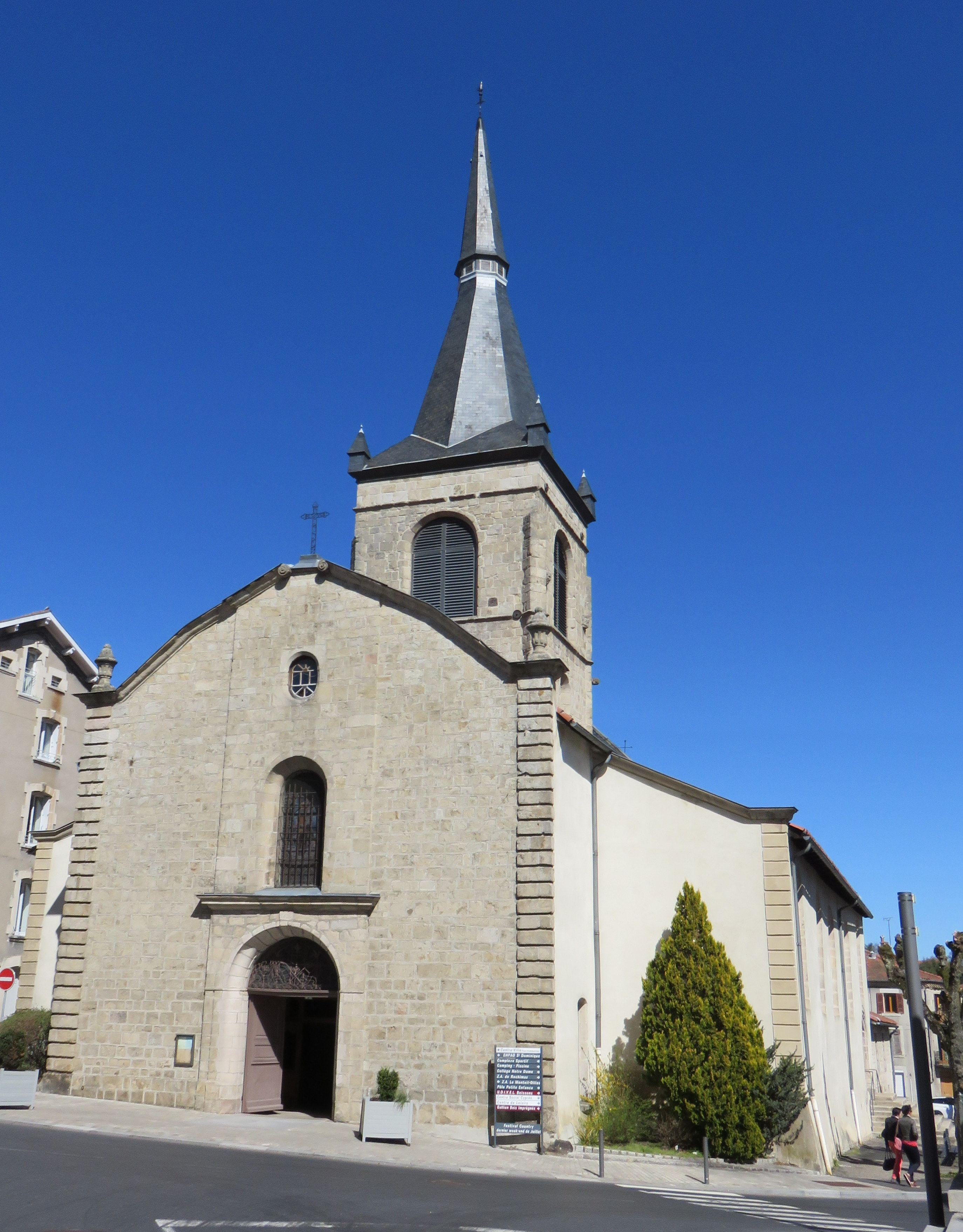 Église Saint-Caprais de Craponne-sur-Arzon (Haute-Loire, France).